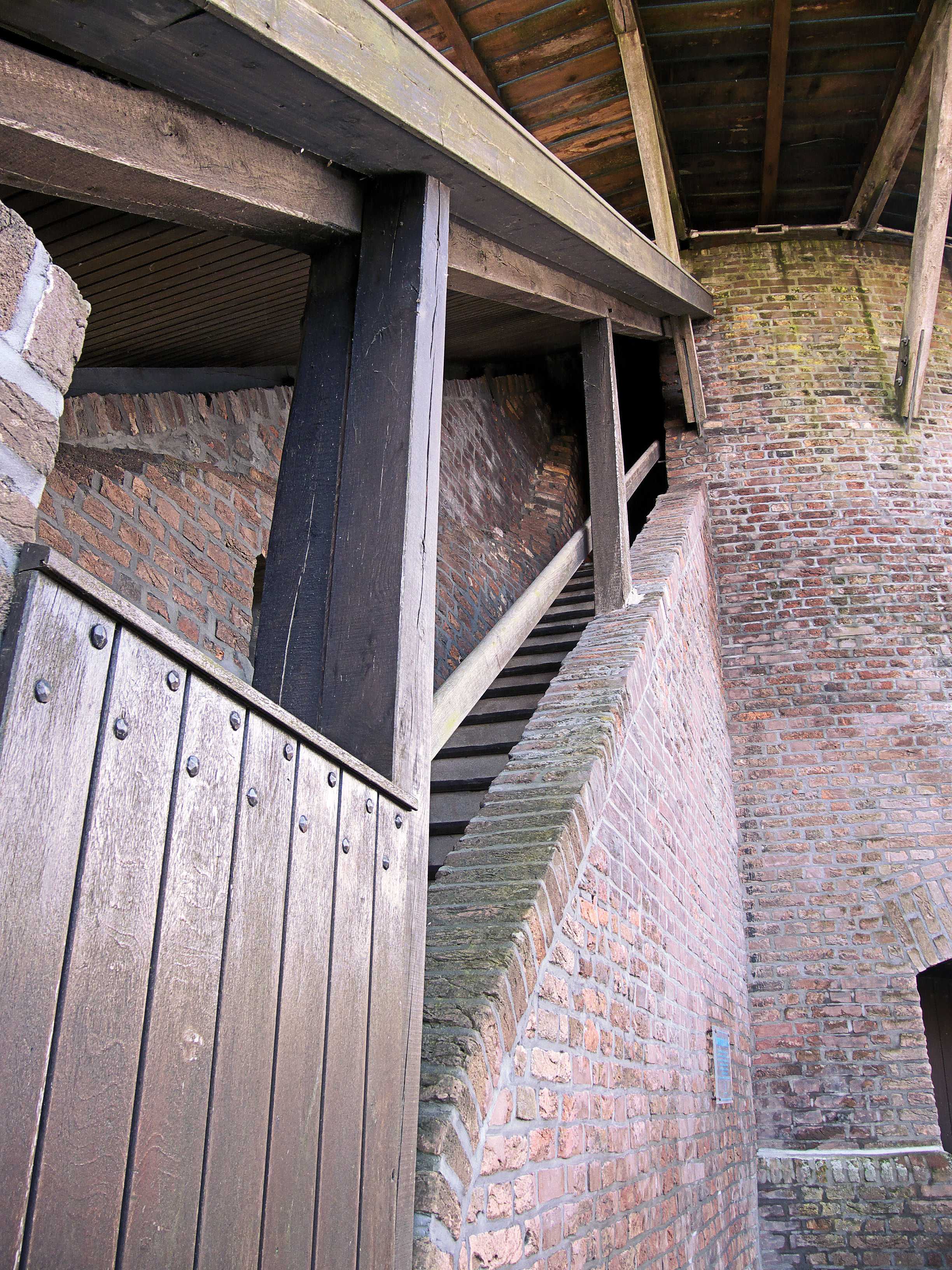 Molen Turmwindmühle Werth, Duitsland: buitentrap